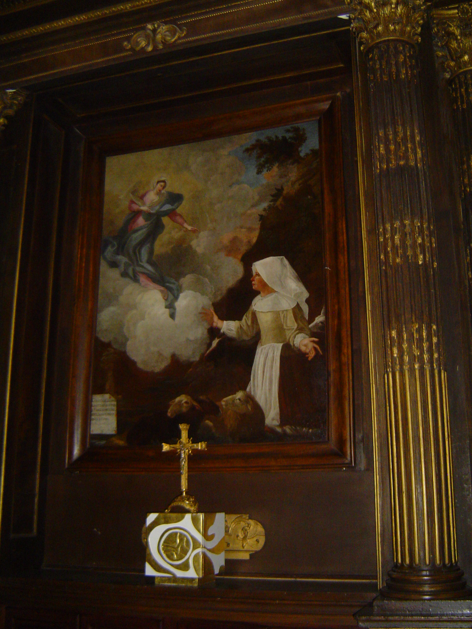 Photo prise à Notre-Dame-du-Laus